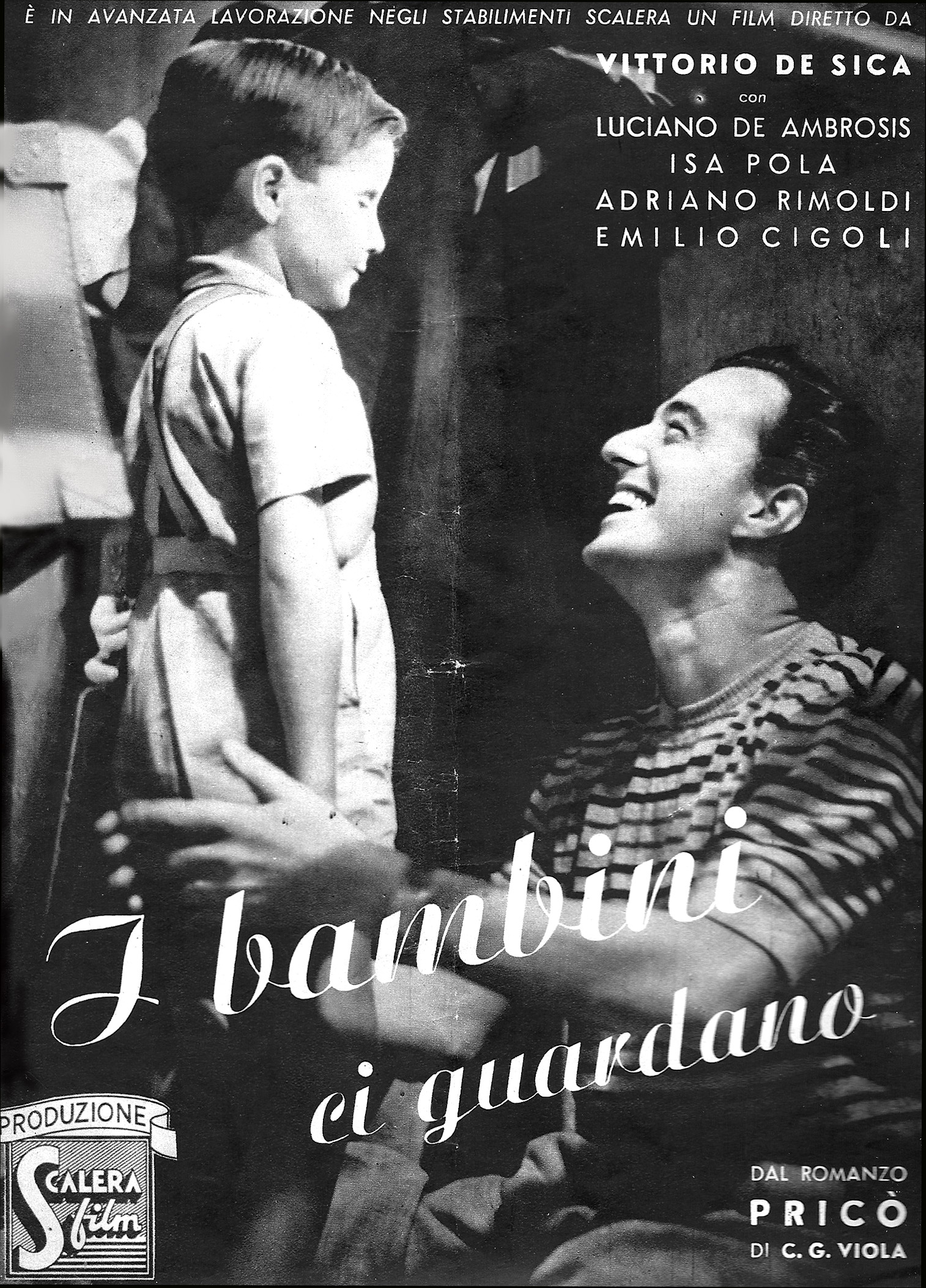 Immagine promozionale di I bambini ci guardano ( De Sica, 1943 - 44)